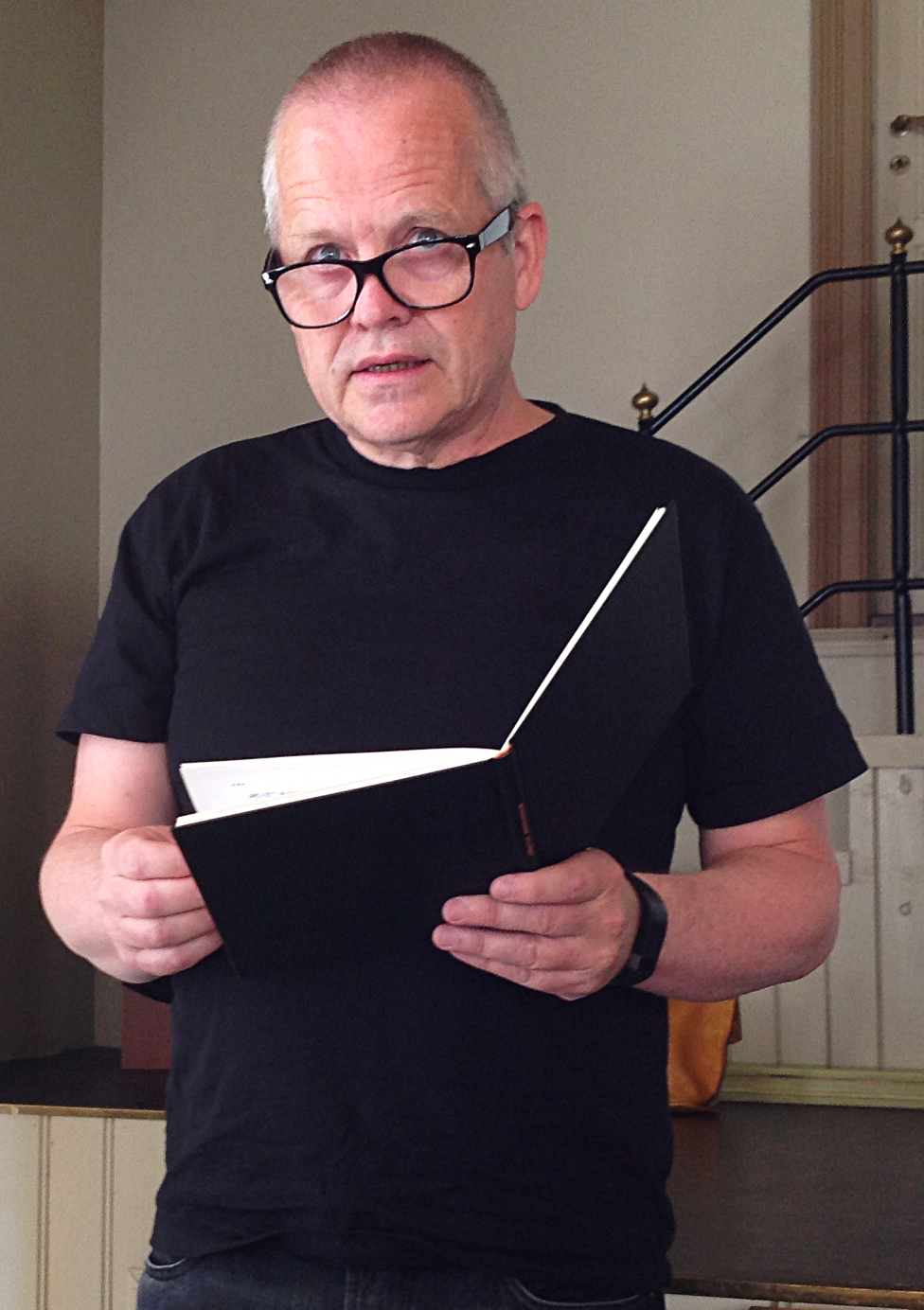 Forfatteren og poeten Øystein Hauge under Lyrikk, takk! i Grimstad.